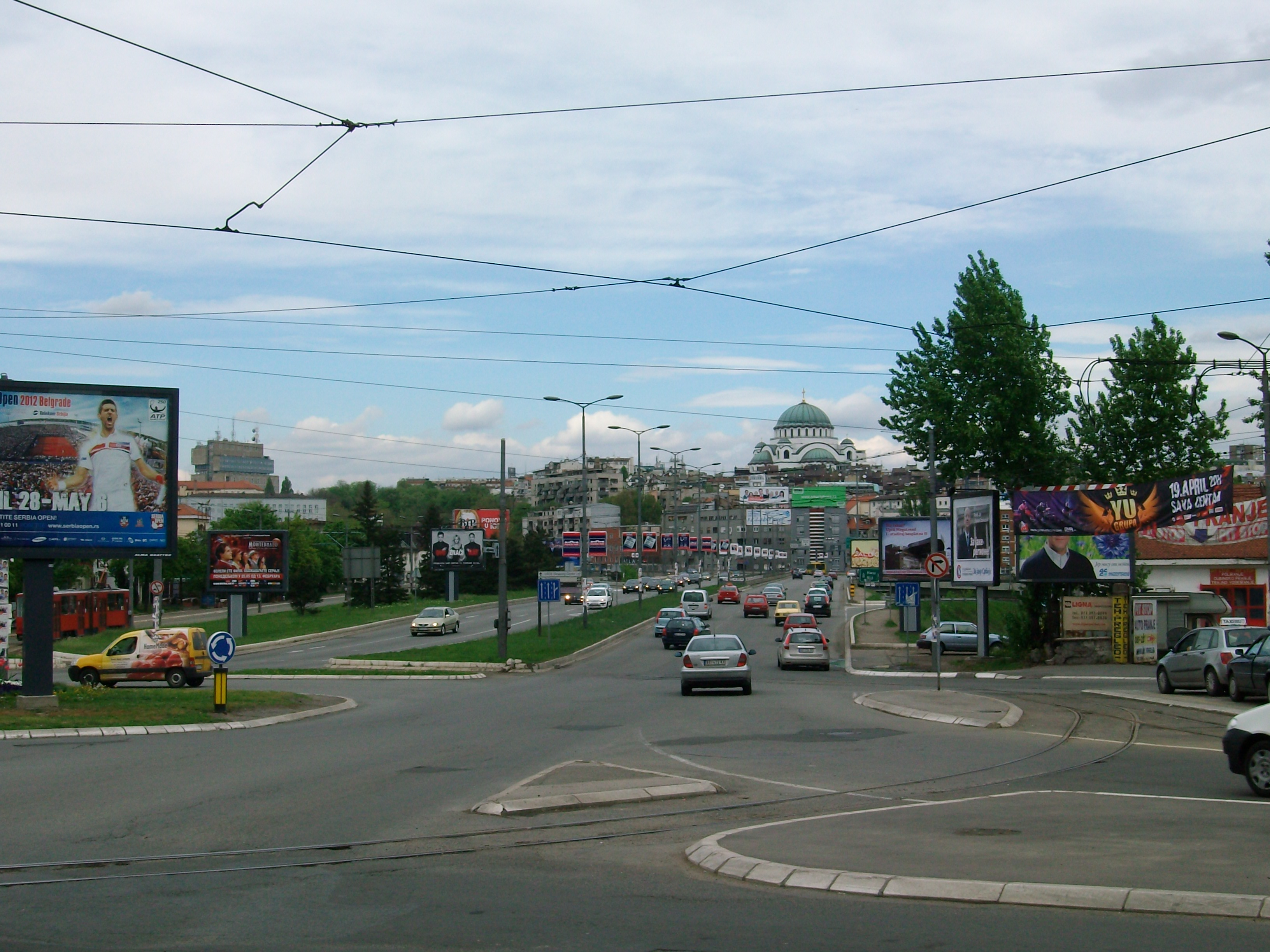 Аутокоманда